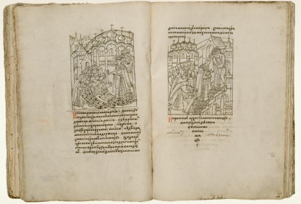 ЛИЦЕВОЙ ЛЕТОПИСНЫЙ СВОД. ЦАРСТВЕННАЯ КНИГА XVI век Москва 687 л. Бумага; чернила, темпера, киноварь; переплет XIX века – картон, кожа; тиснение 44 х 31 х 8,7 Поступила в 1920 году Происходит из Синодальной патриаршей библиотеки, Москва ГИМ инв. 80370, ОР Син. 149